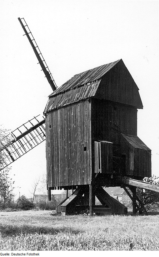 Original image description from the Deutsche Fotothek Jessen (Elster)-Schöneicho. Bockmühle